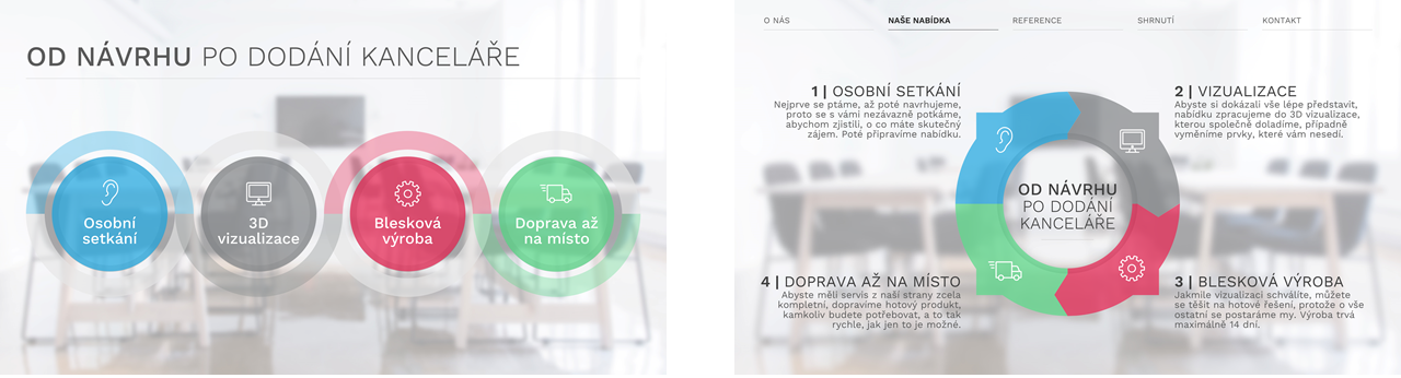 Autor: odprezentuj.cz